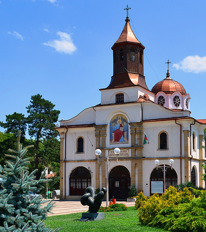 Паметник в Карнобат на българо-руската дружба.